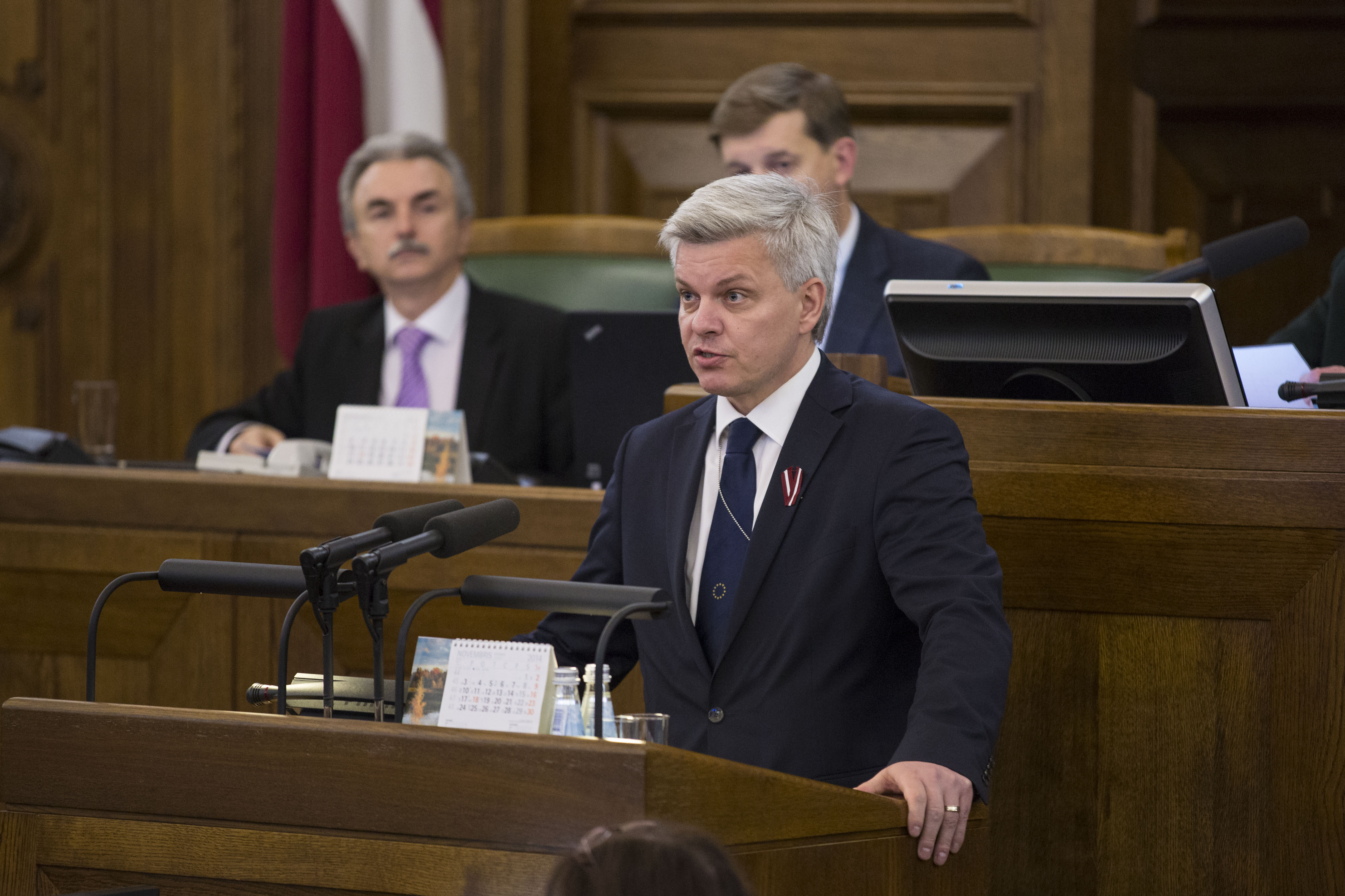 2014.gada 4.novembris. Deputāts Veiko Spolītis dod svinīgo solījumu. Foto: Reinis Inkēns, Saeimas Kanceleja Izmantošanas noteikumi: saeima.lv/lv/autortiesibas